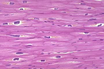 Šiedies raumuo